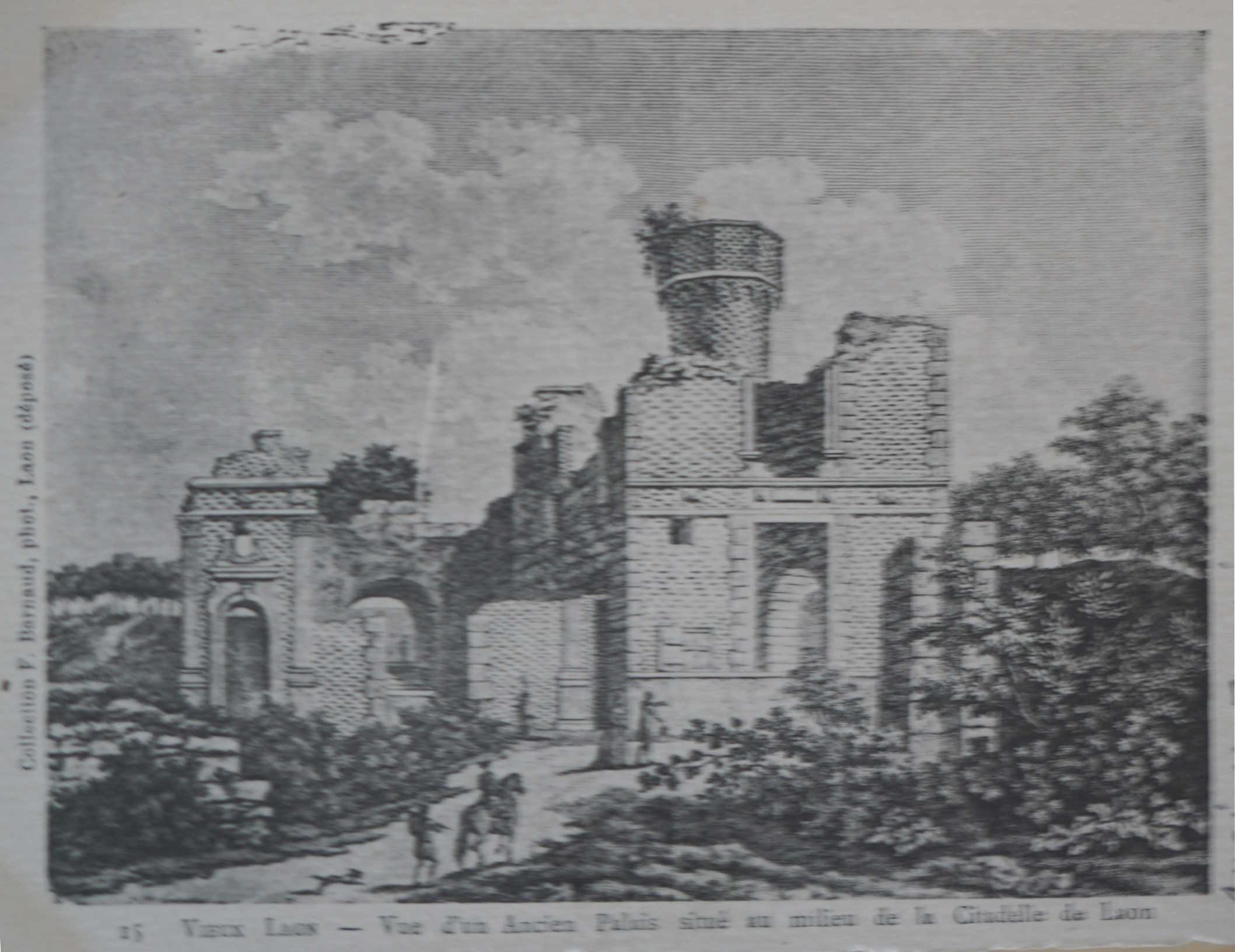 vue d'une Cartes postales de Laon le palais du gouverneur.